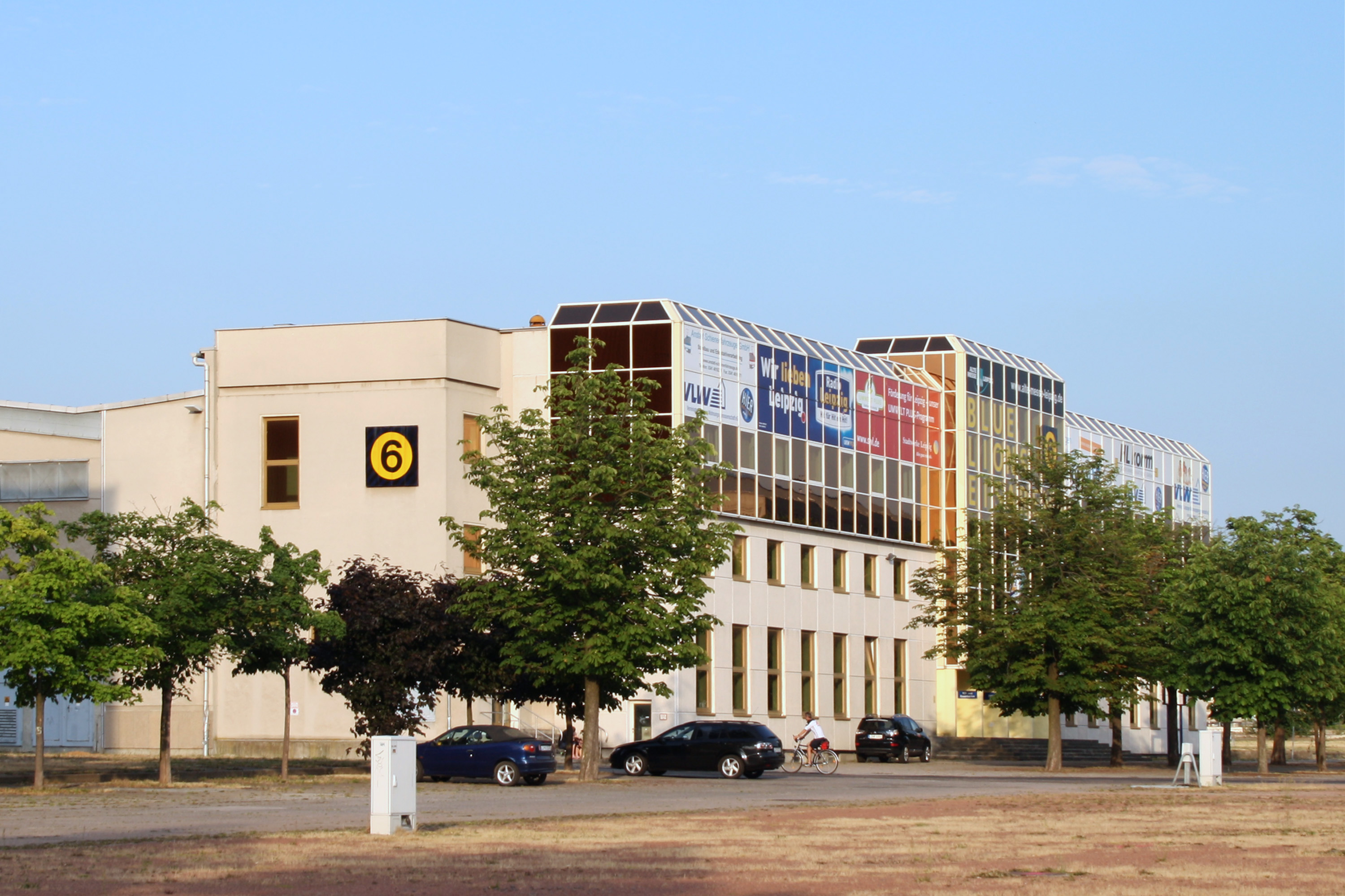 Die als Eisstadion genutze Messehalle 6 auf dem alten Leipziger Messegelände.